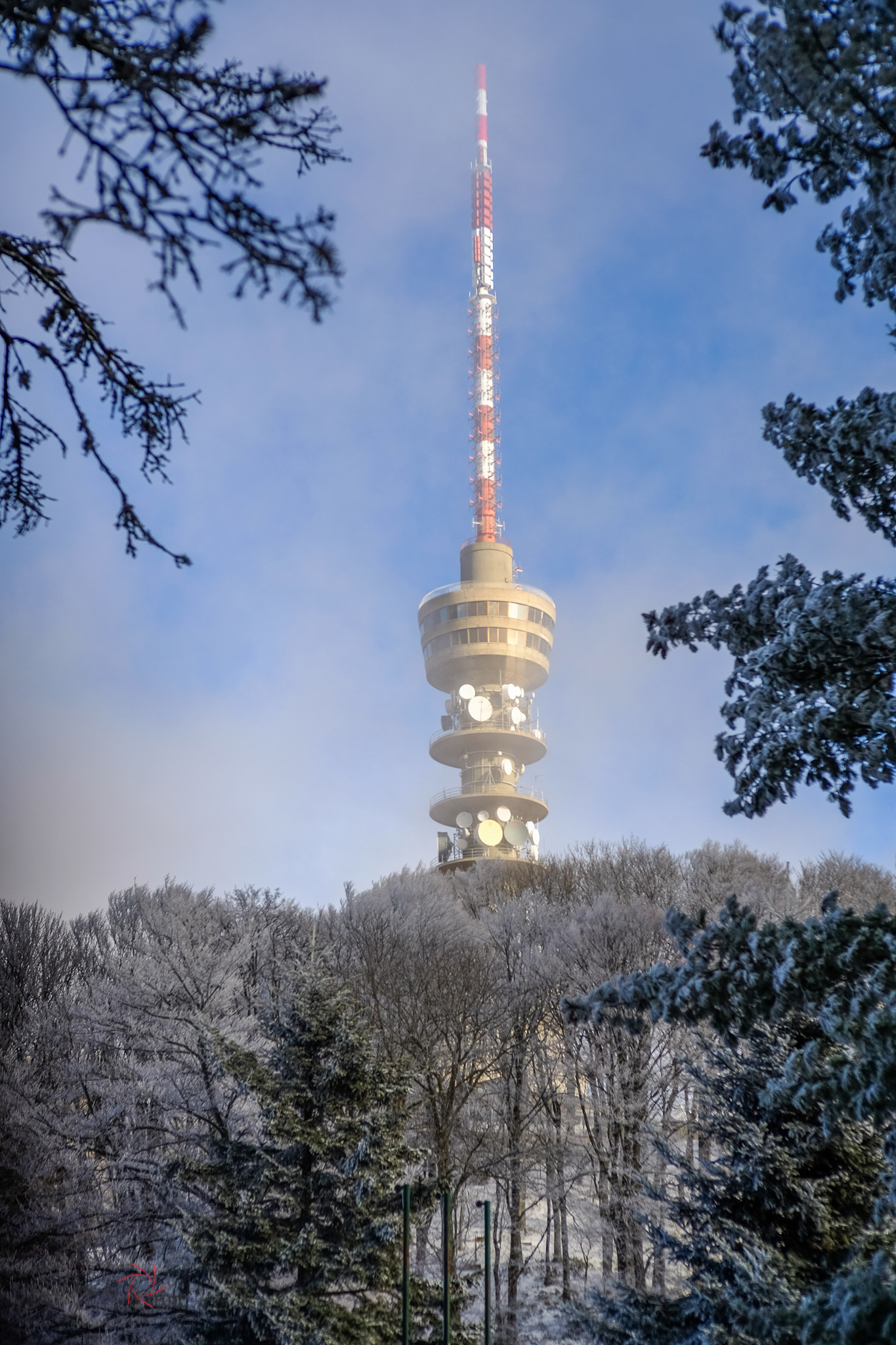 Sljeme